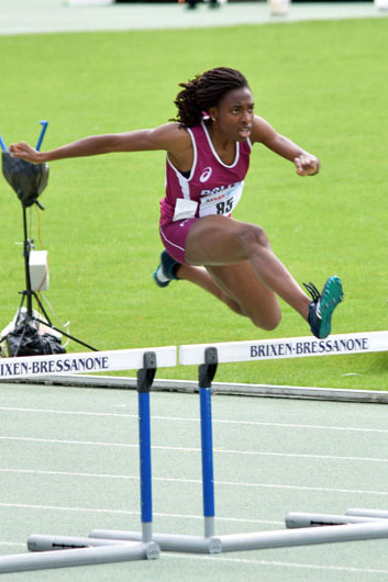 Foto Ayomide Folorunso/trackarena